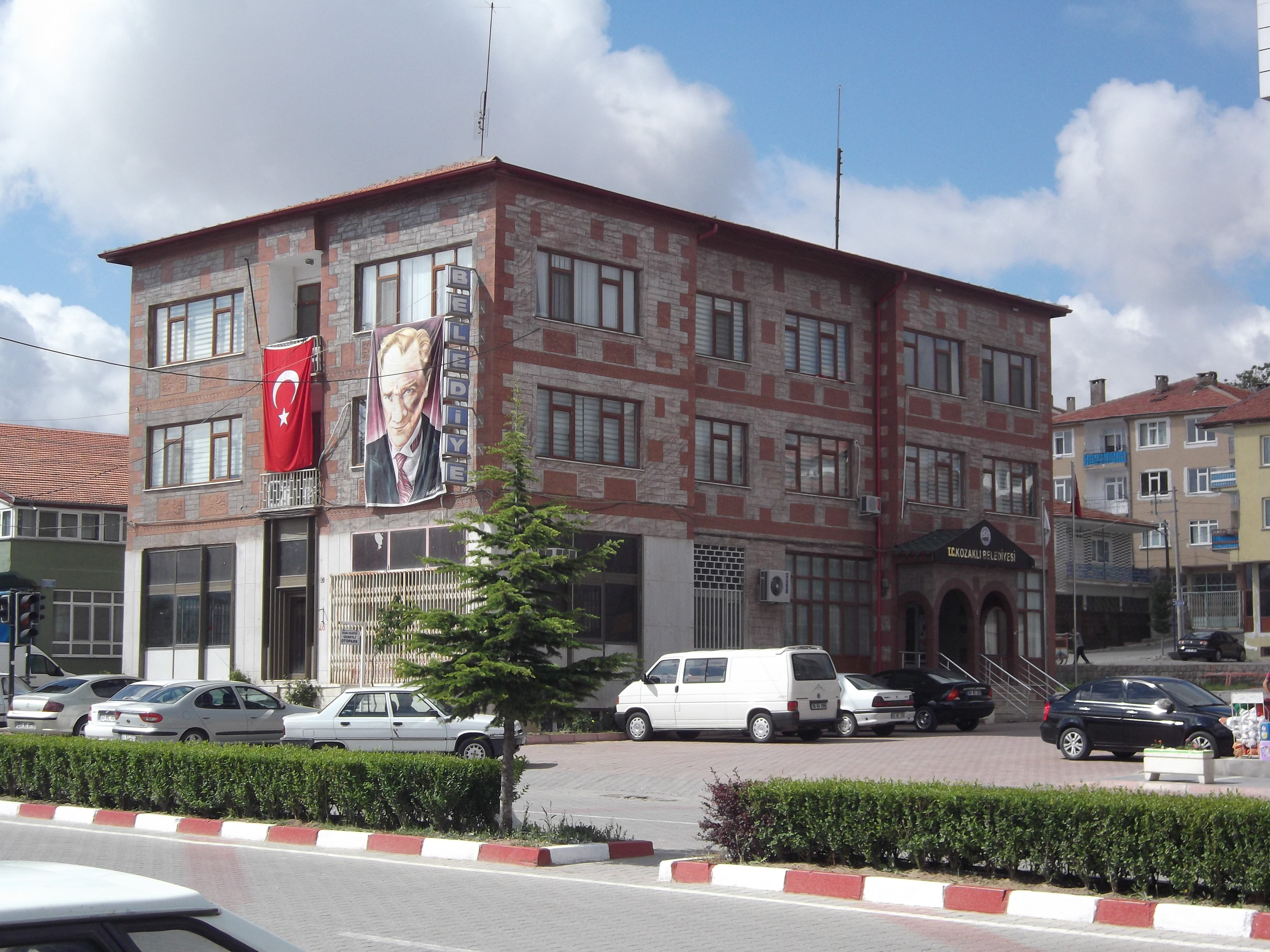 Kozaklı Belediyesi